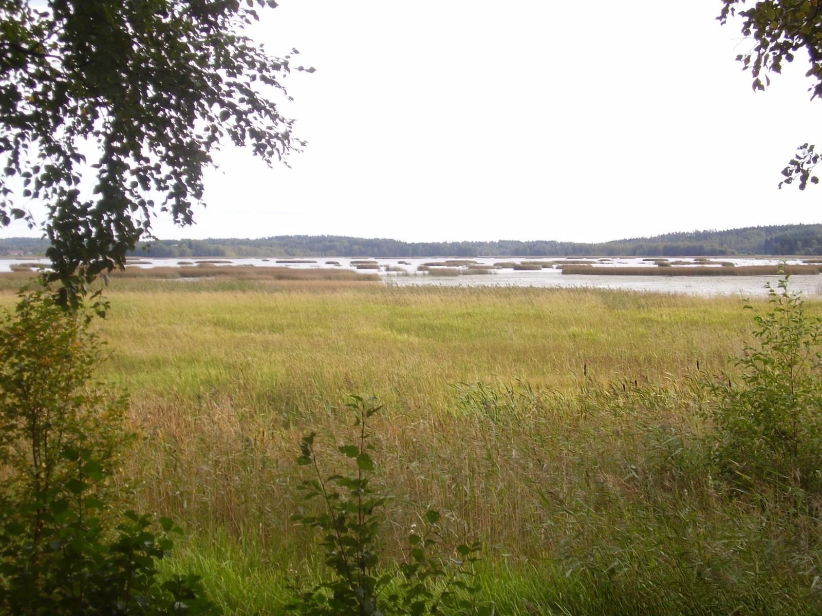 Kuva Kortejärvestä